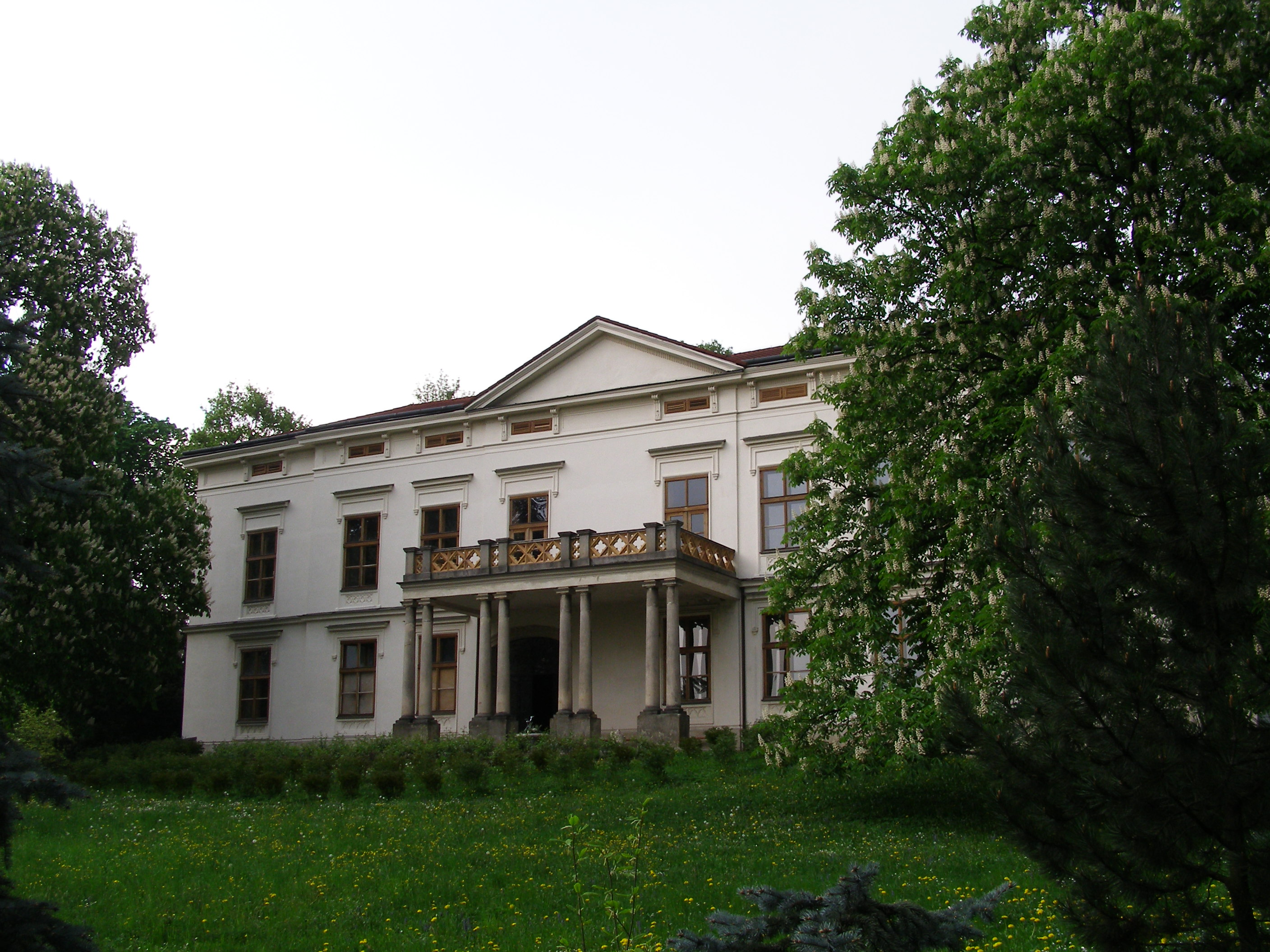 Zámek v Lešné u Valašského Meziříčí